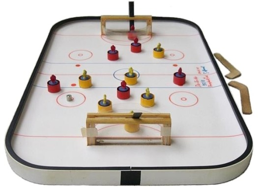 Do-To-Ho ...das abgefahrene Tischeishockeyspiel mit jeder Menge Umdrehungen